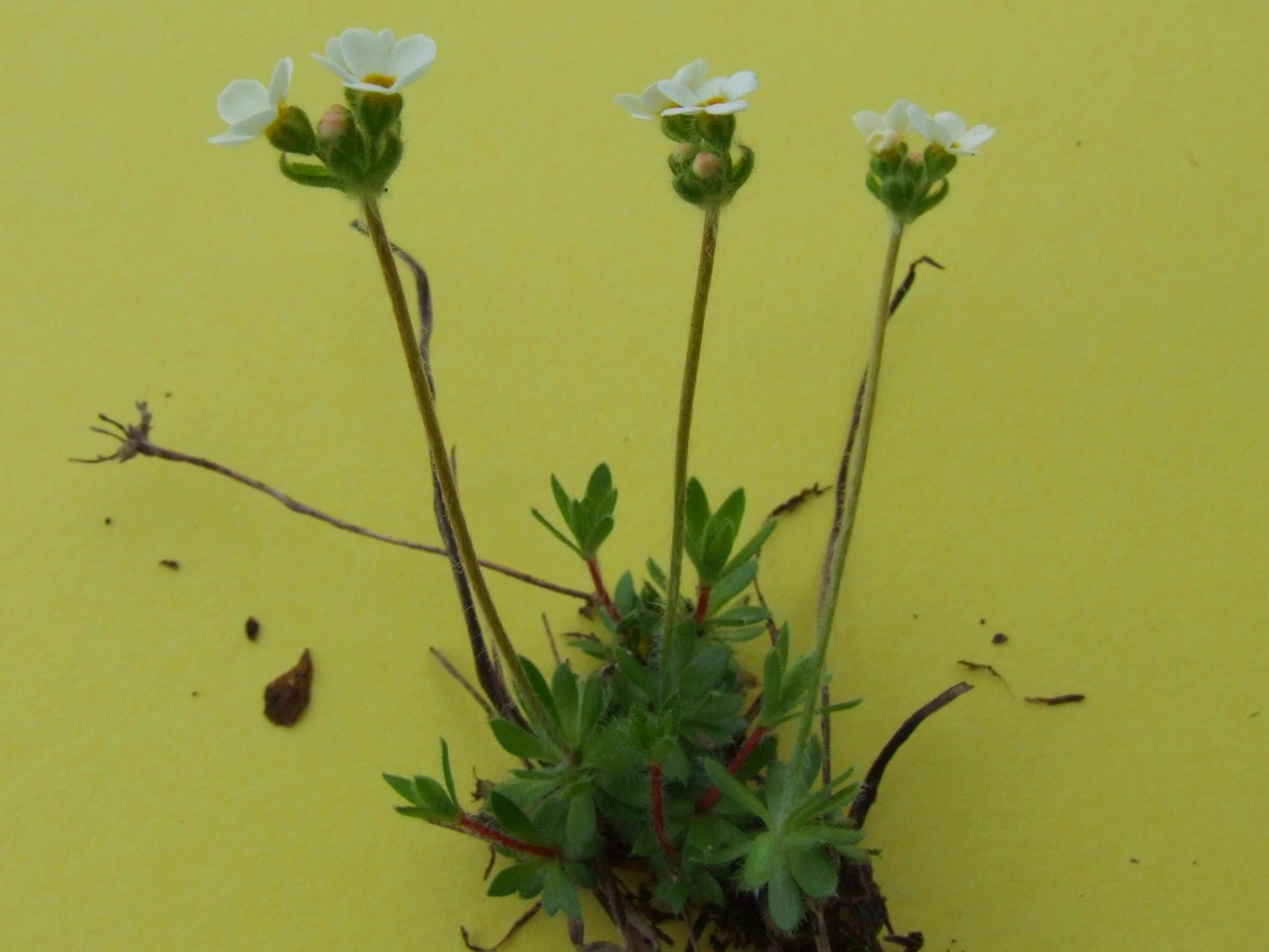 Androsace chamejasme